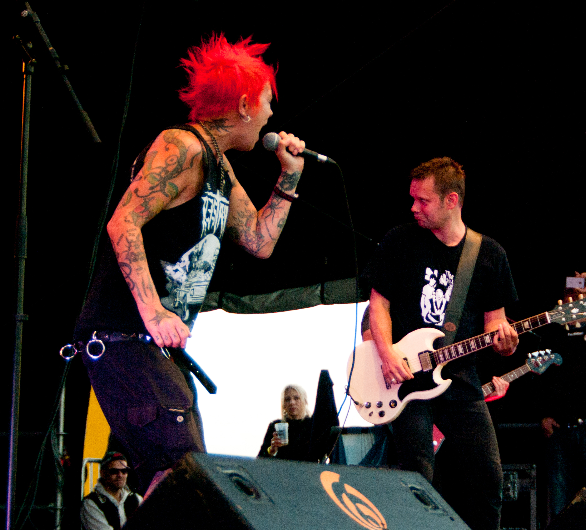 Resist-to-Exist-Punkfestival in Kremmen 2017. Popperklopper